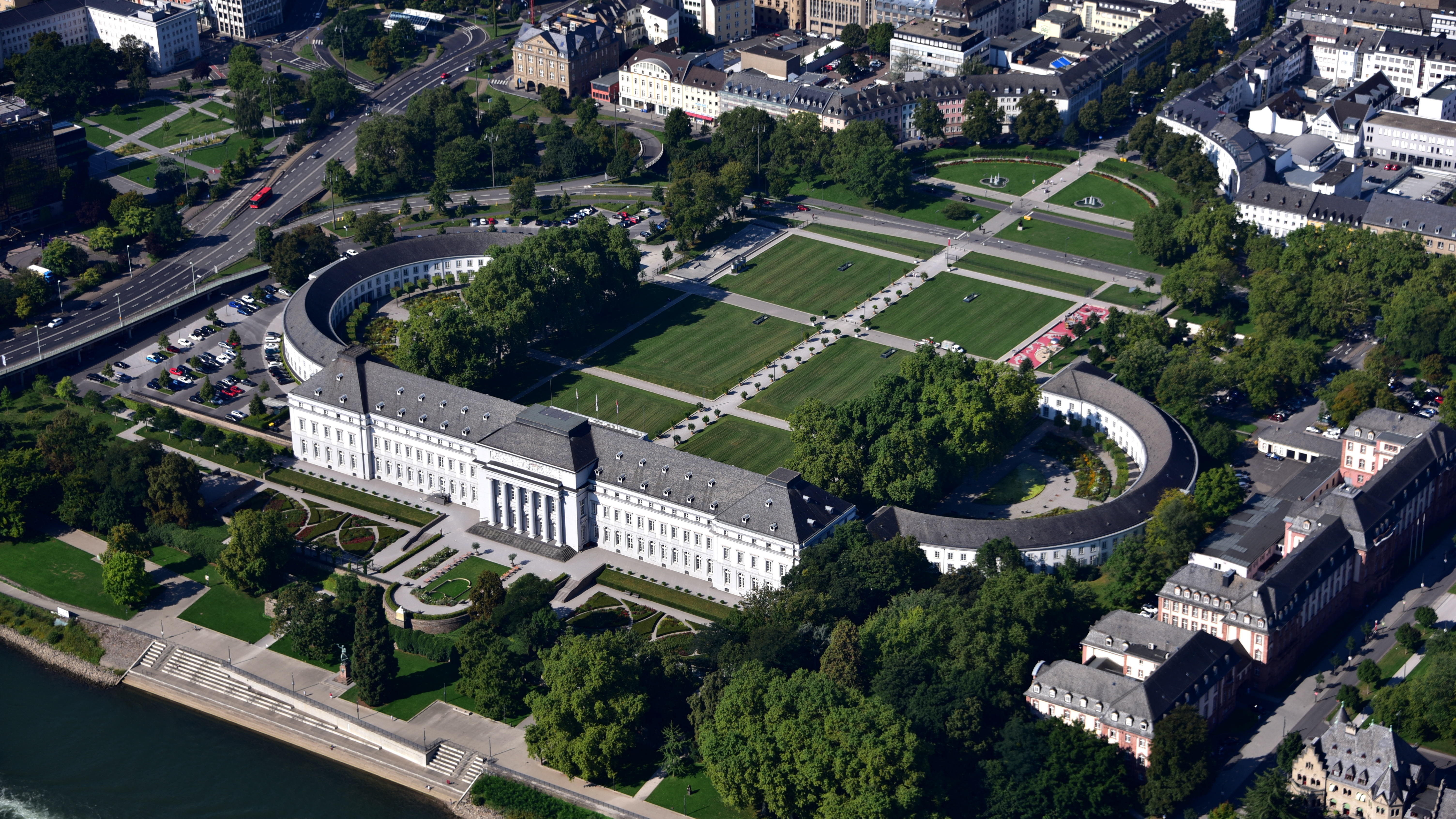 Koblenz, Kurfürstliches Schloss (Koblenz) , Luftaufnahme (2017)